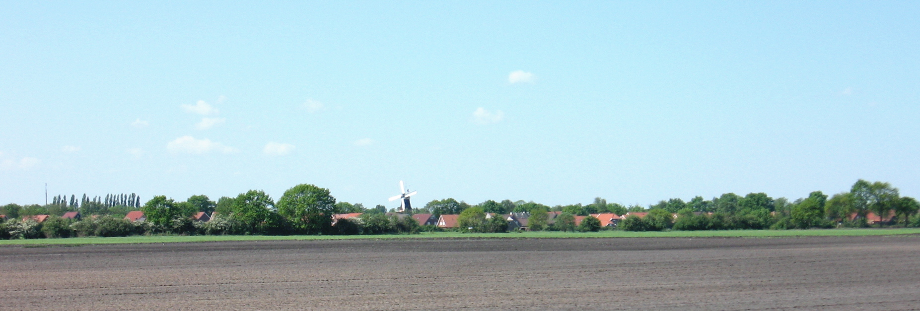 Bunde, Duitsland